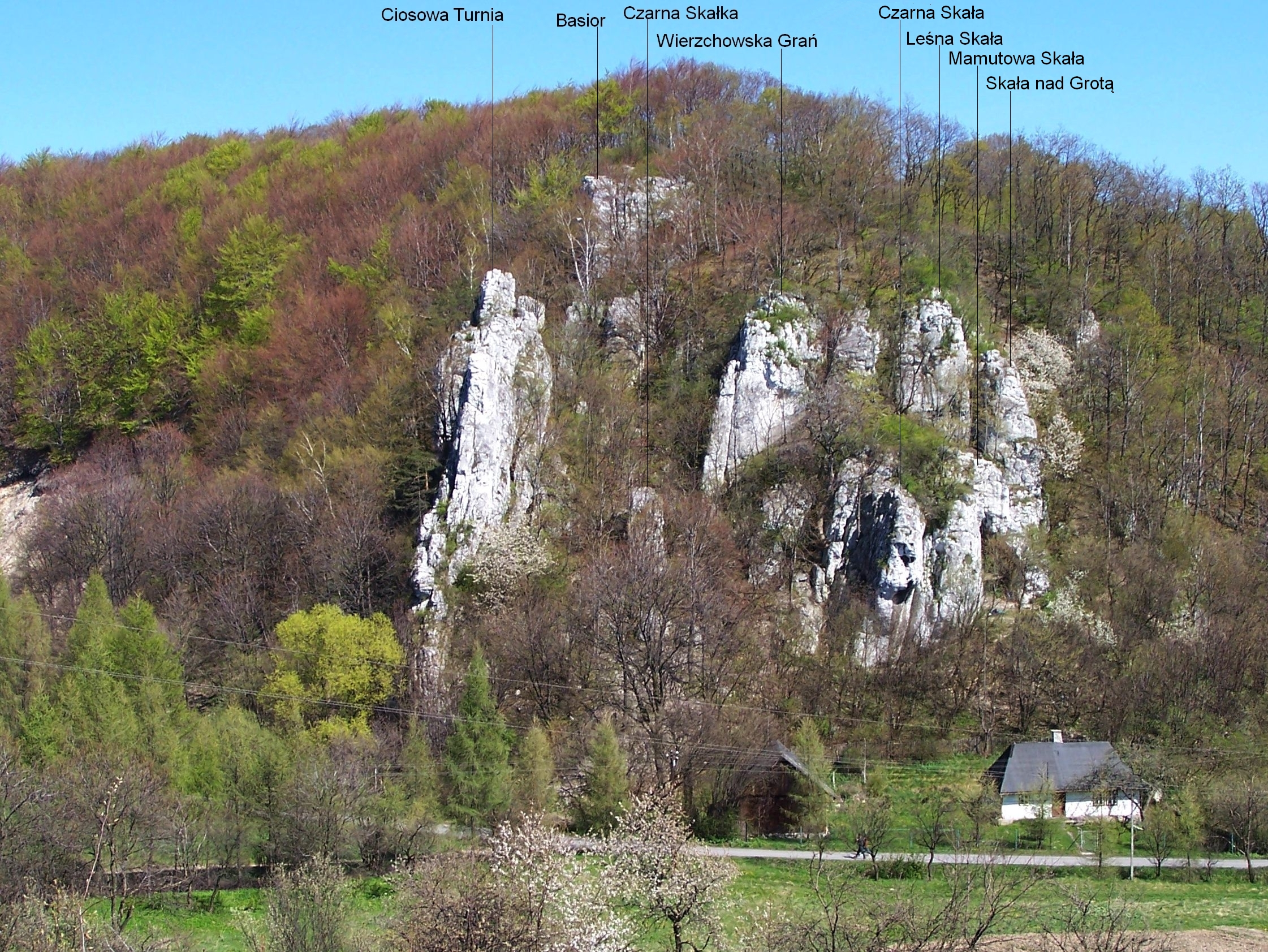 Skały w Wierzchowiu